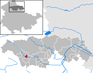 Rockstedt in Thuringia - Kyffhäuserkreis